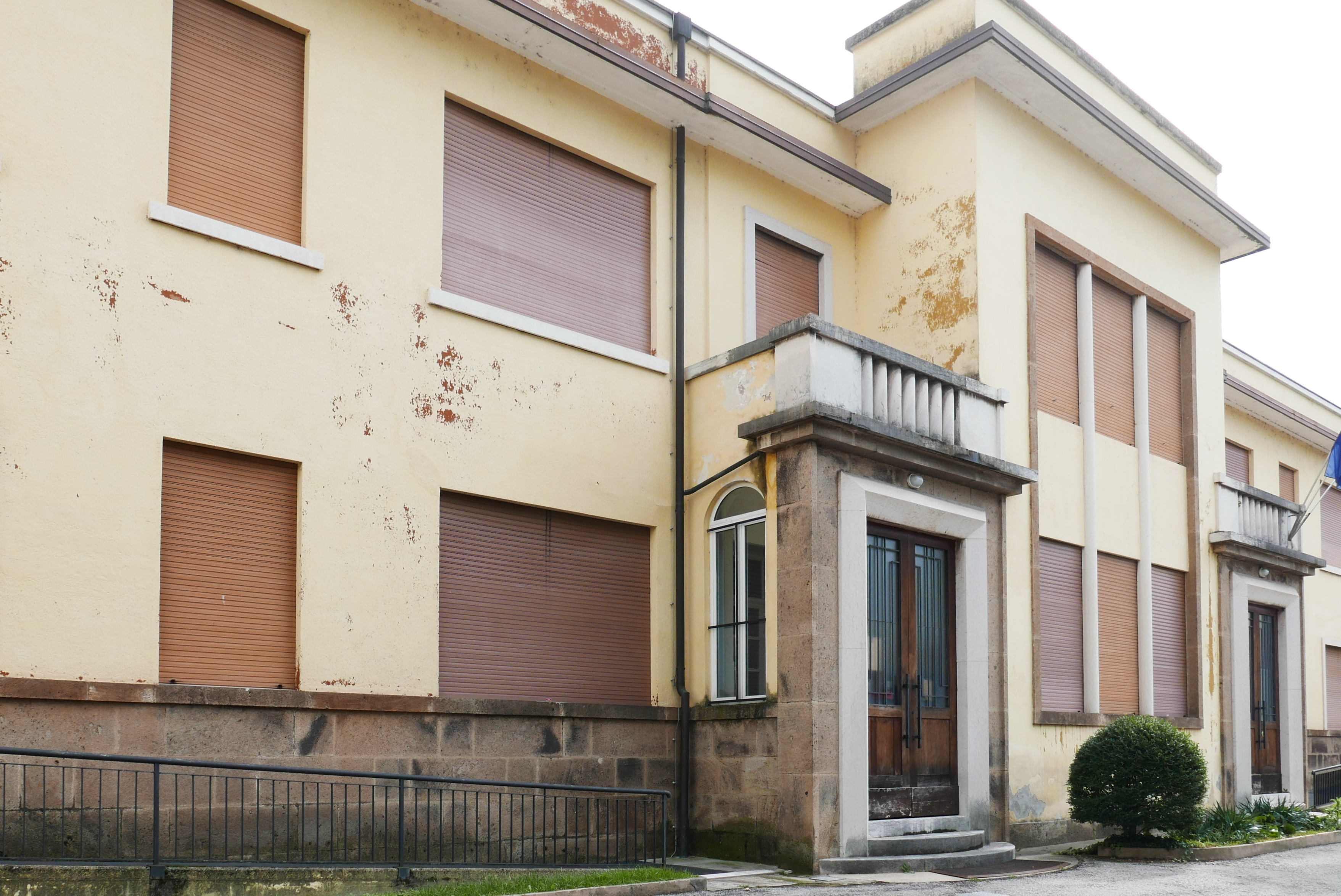 Vicenza - Ex-Dispensario TBC, poi Cetro di servizi psichiatrici